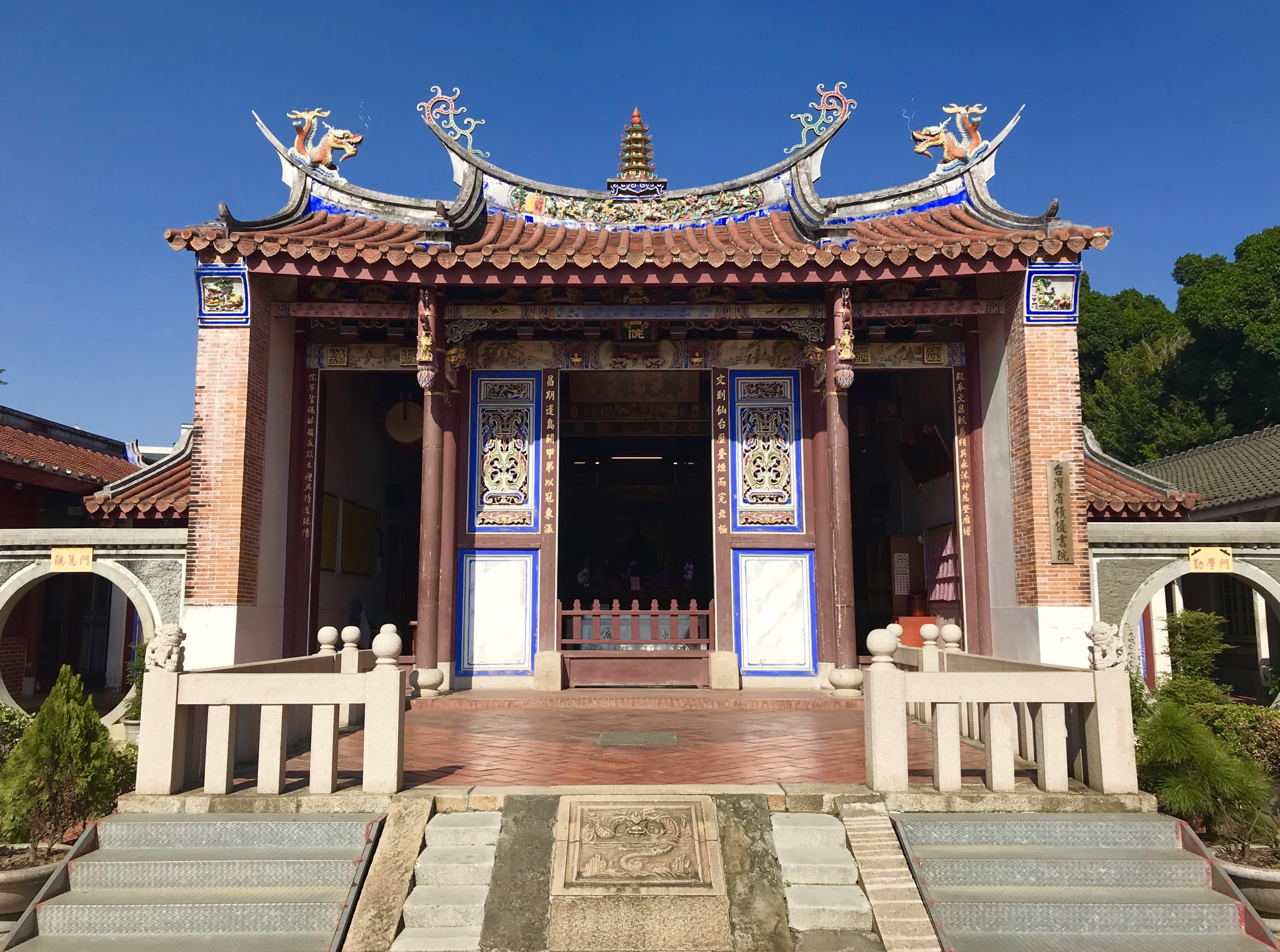 興賢書院正殿